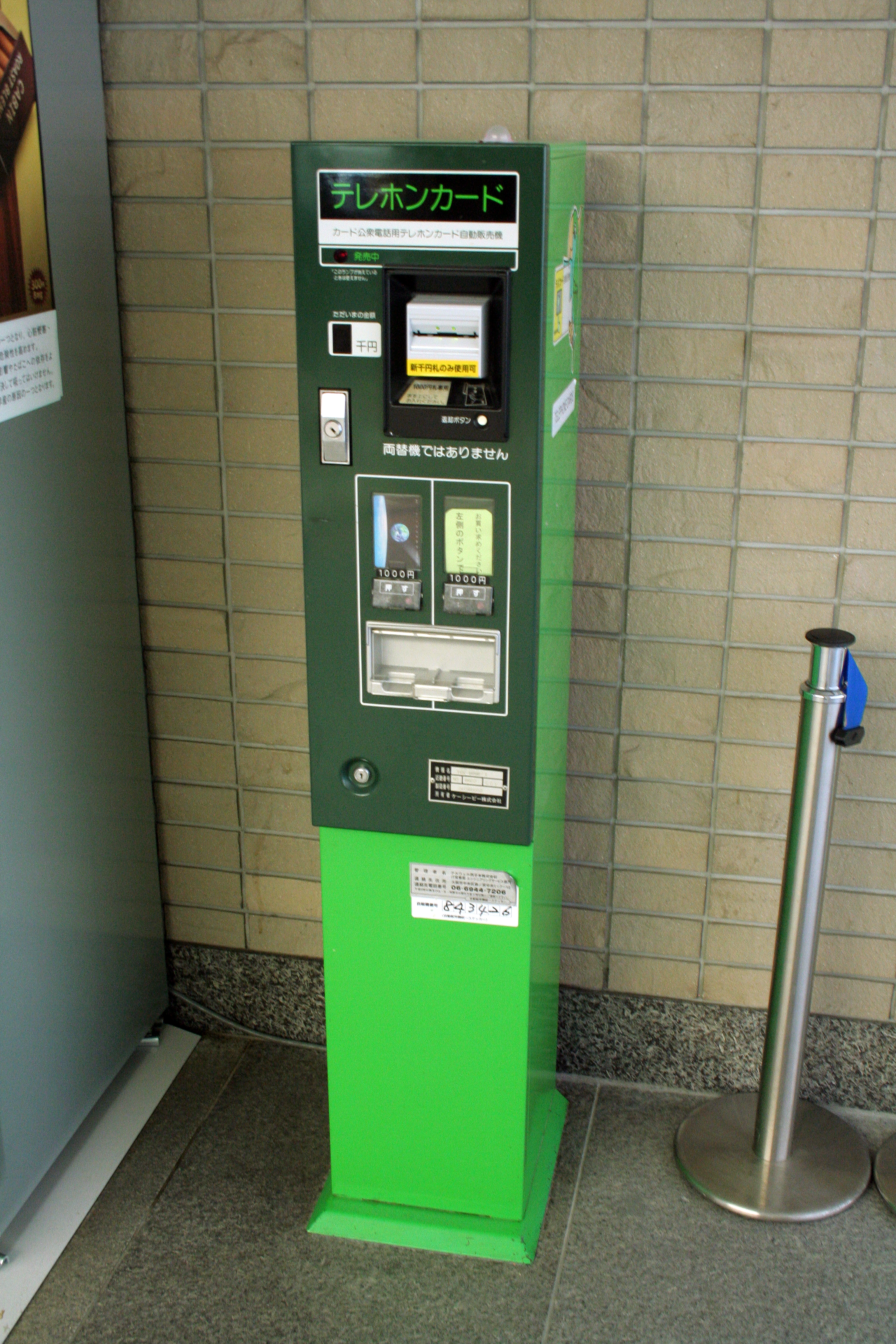 姫路市内で撮影した写真。 テレホンカードの自動販売機。